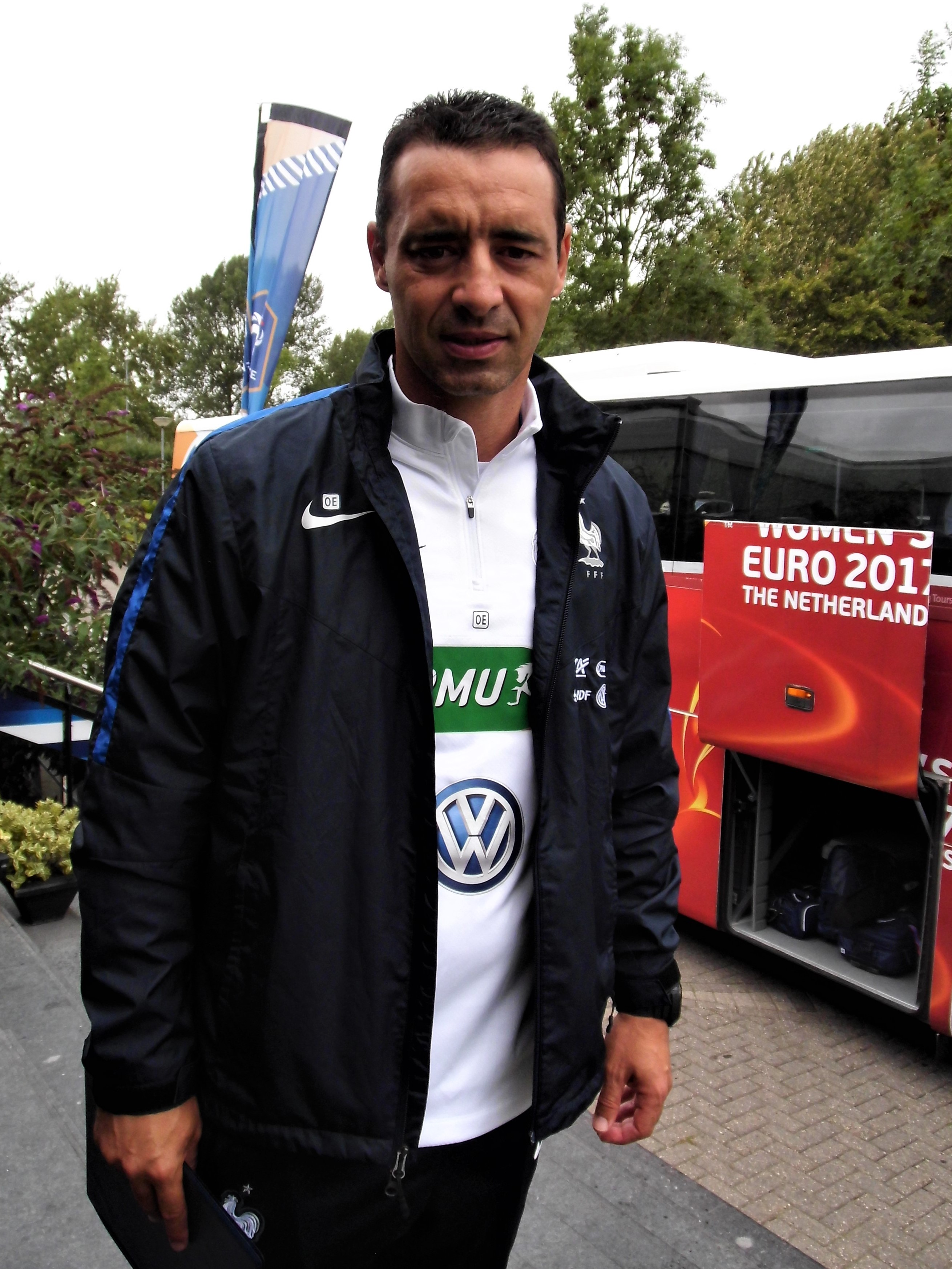 Olivier Echouafni vor dem französischen Mannschaftshotel in Zwijndrecht während der Frauen-EM 2017